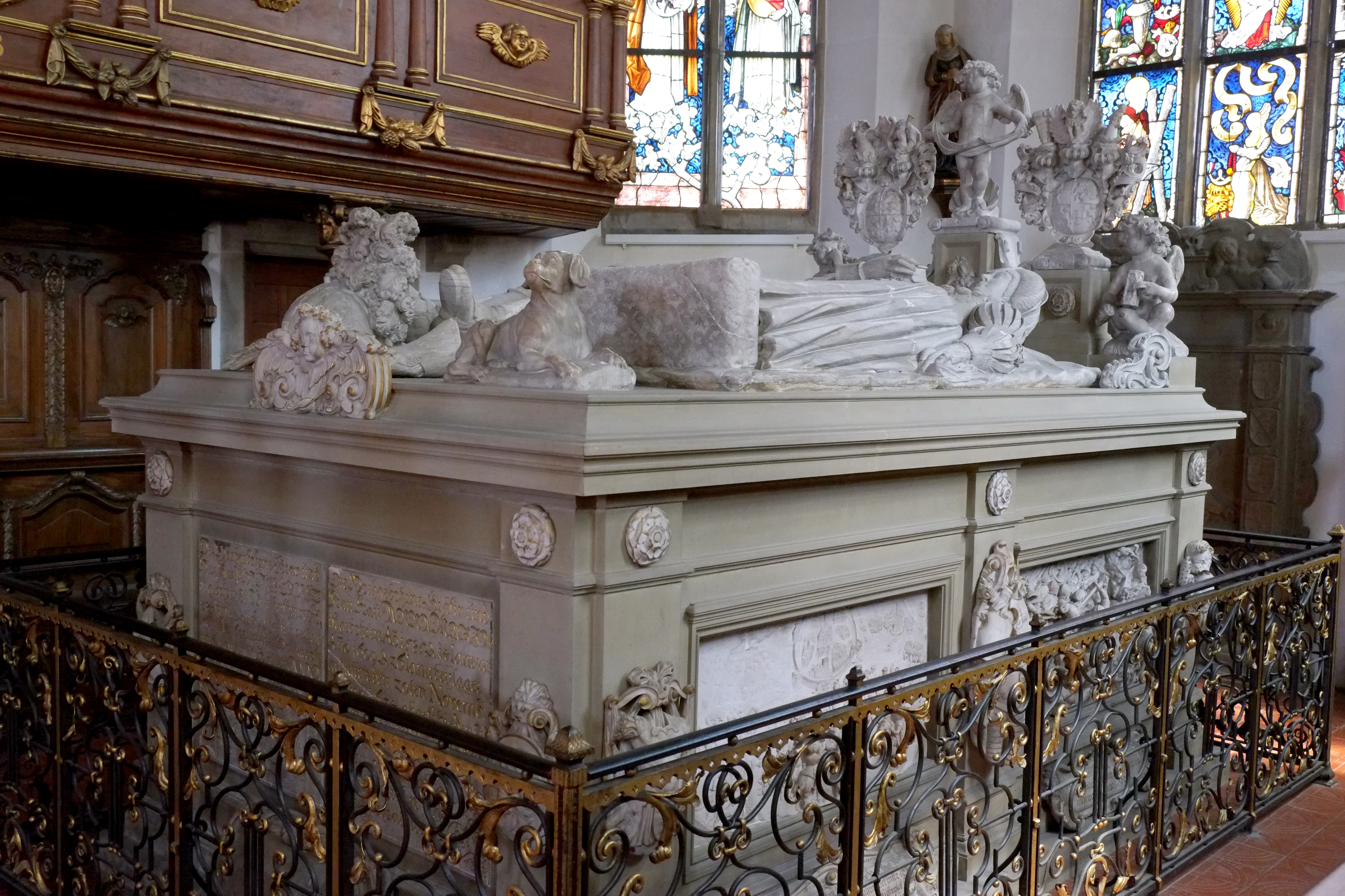 Grabmal des Grafen Philipp Ernst von Hohenlohe-Langenburg und seiner Gemahlin in der evangelischen Stadtkirche in Langenburg im Landkreis Schwäbisch Hall (Baden-Württemberg, Deutschland)